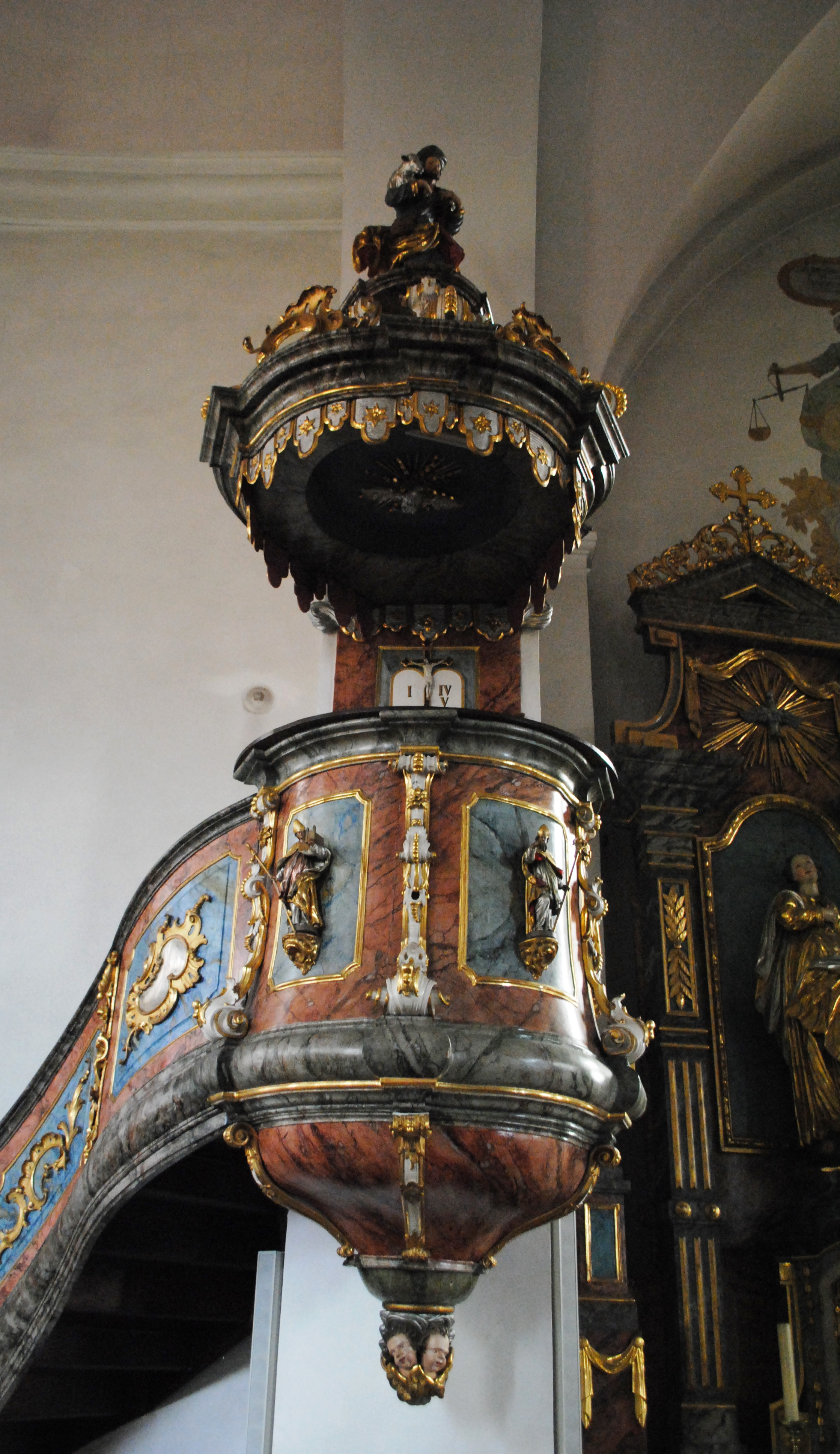 Kanzel, St. Jakobus Großlangheim